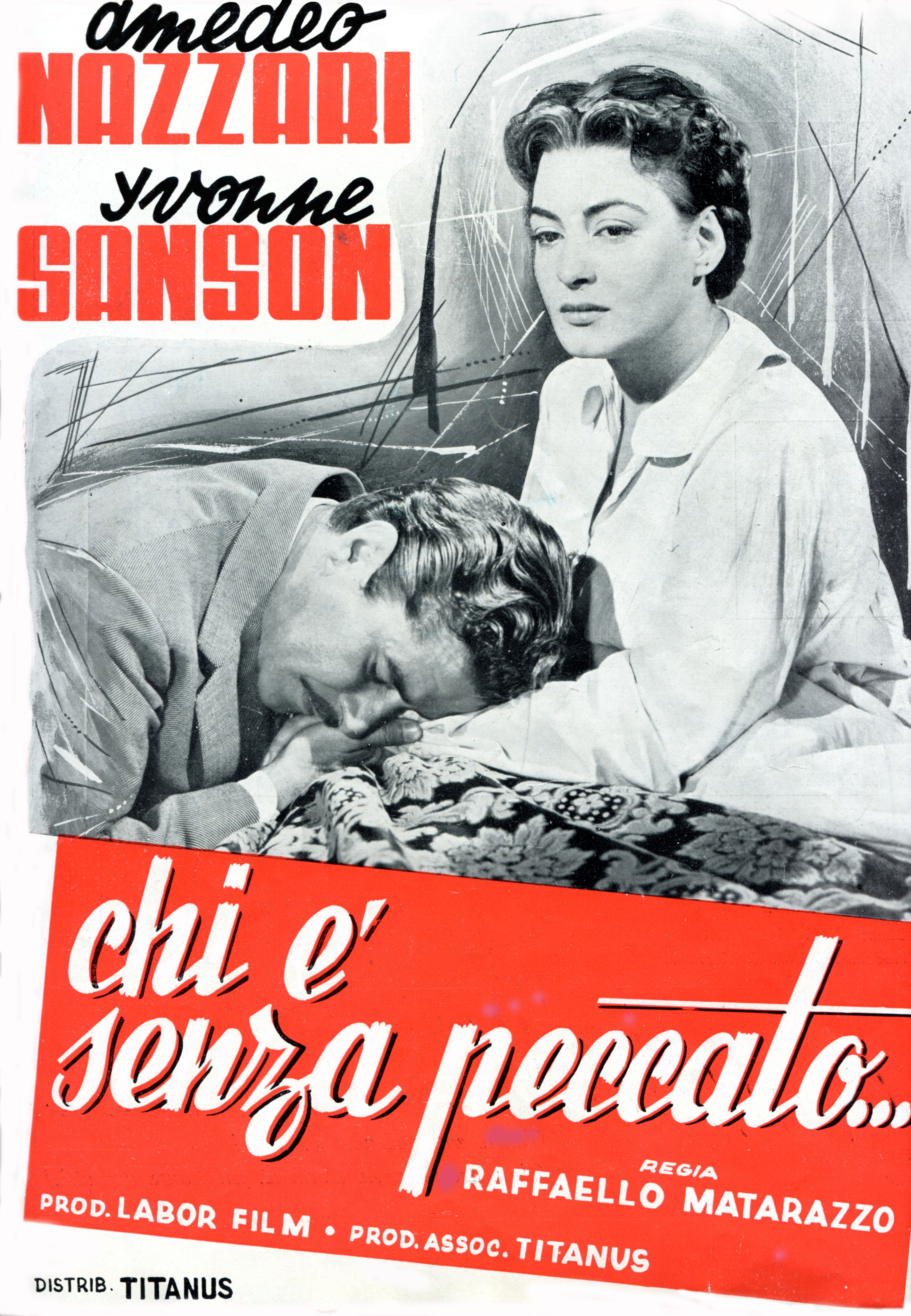 Locandina del film "Chi è senza peccato" (Matarazzo, 1953)